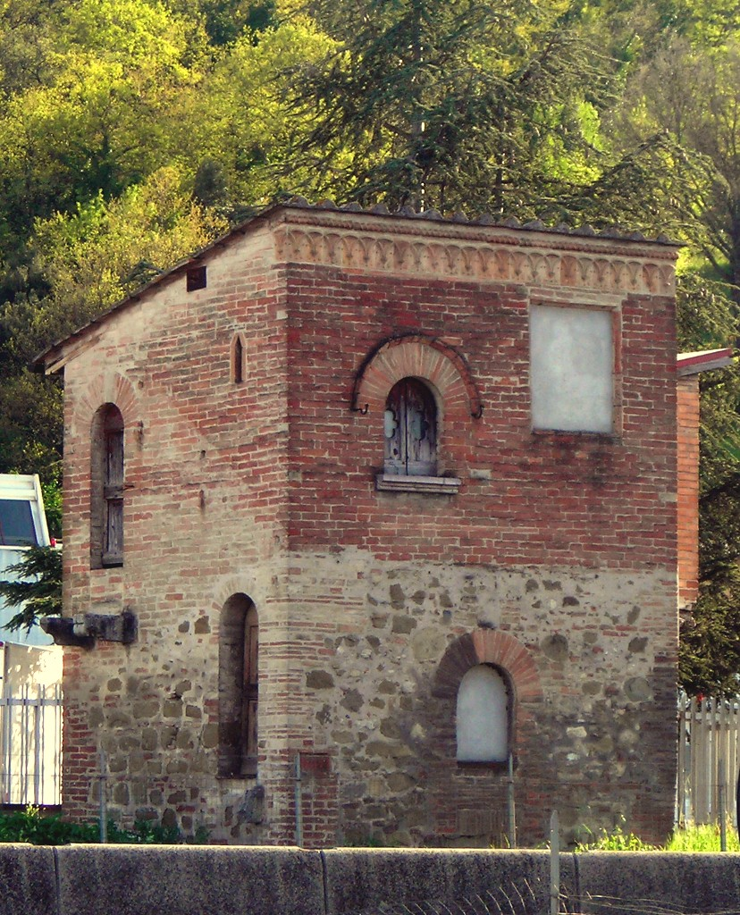 Casetta Piceller, Collestrada, Ponte San Giovanni, Perugia, Umbria, Italy